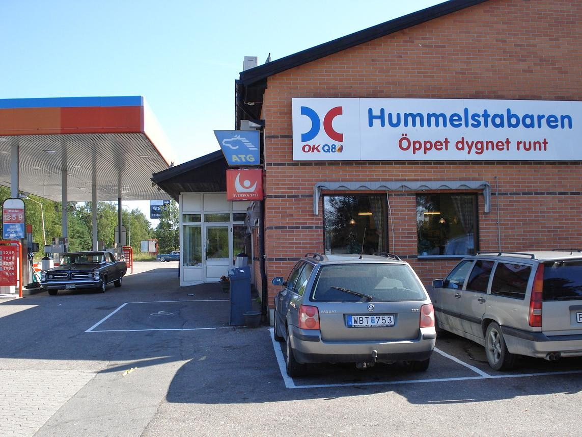 Hummelstabaren i Hummelsta, vid Europaväg 18